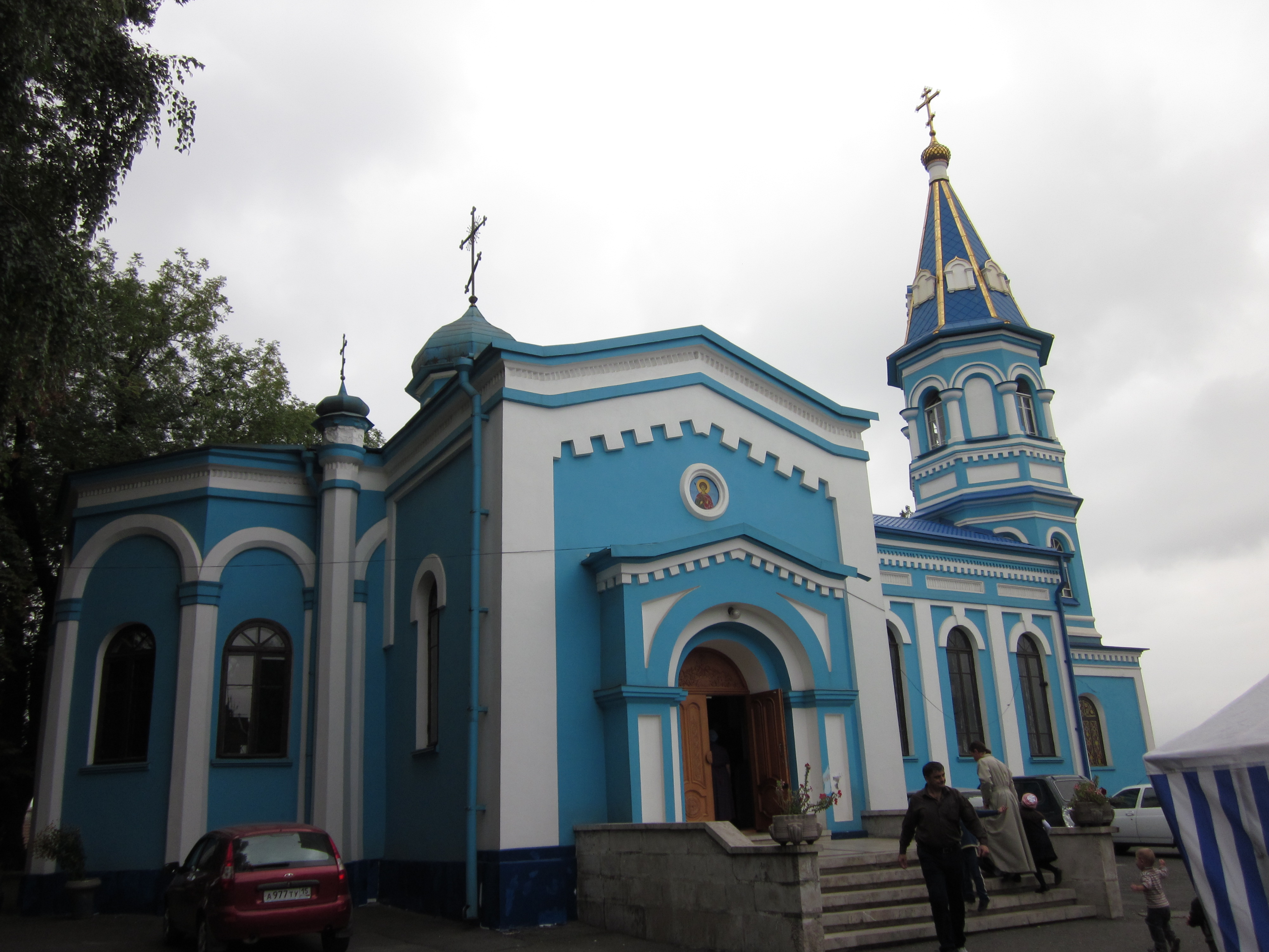 Находится по адресу: улица Хетагурова, дом 23.